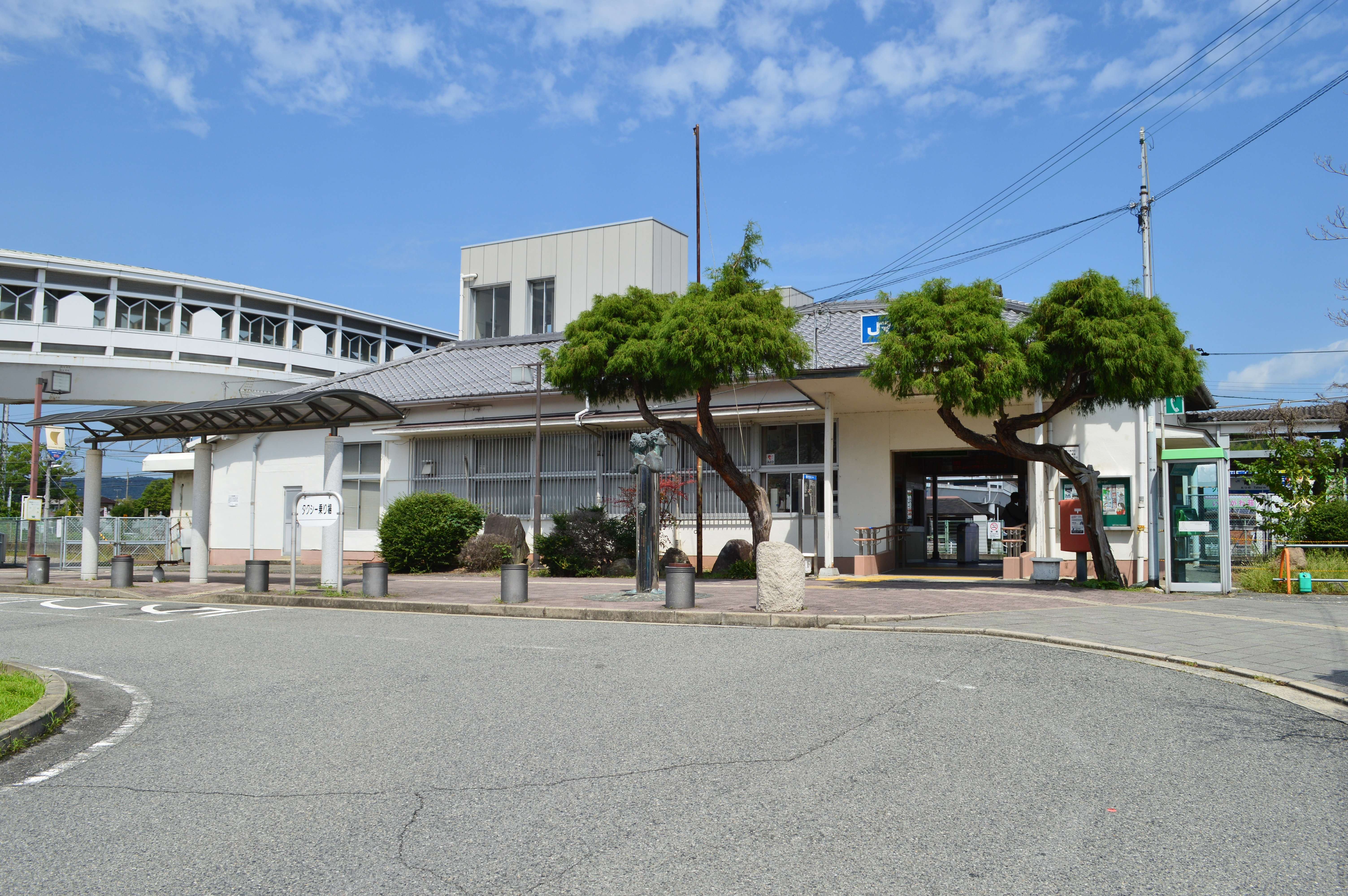 竜野駅 駅舎